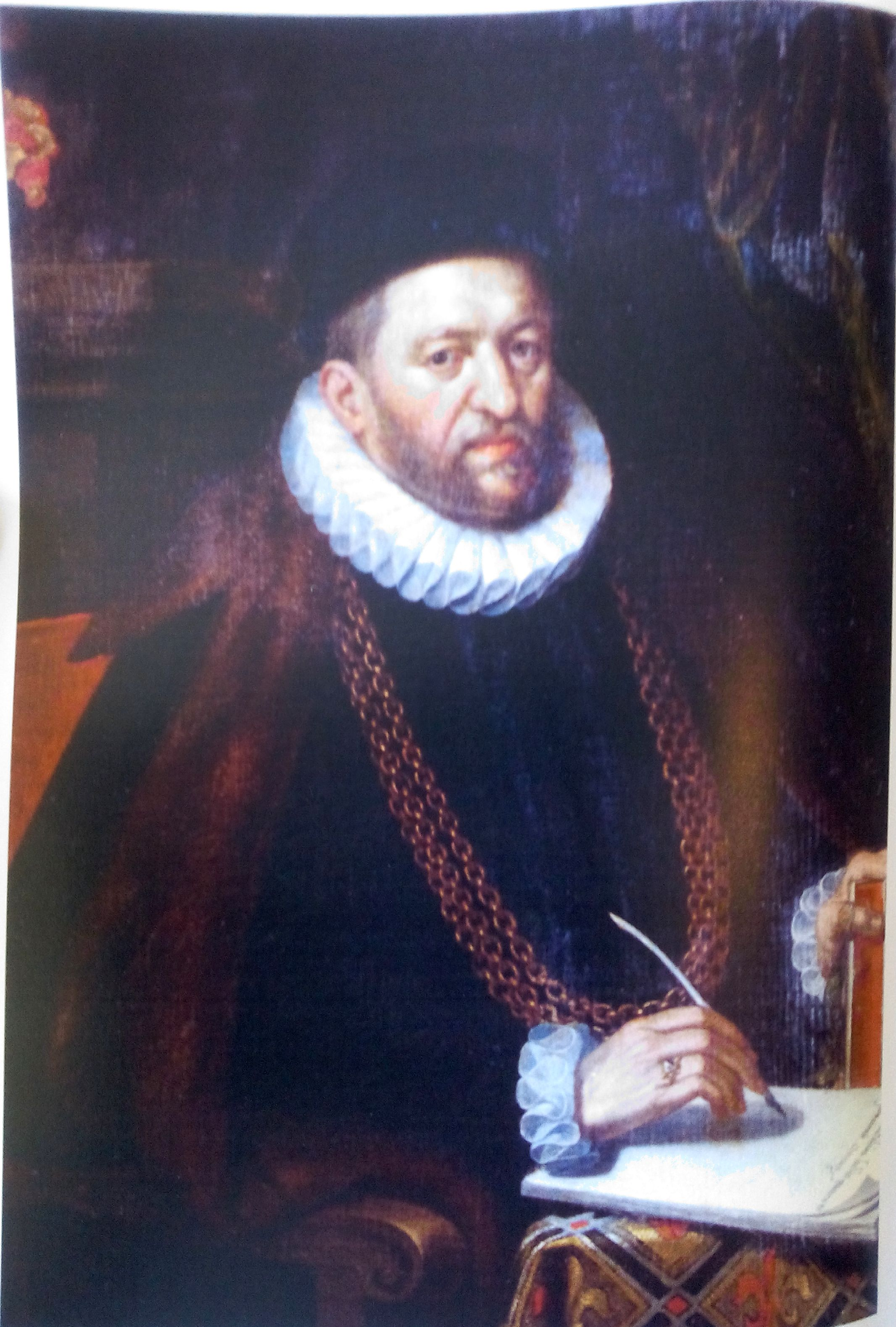 Andreas de Gail